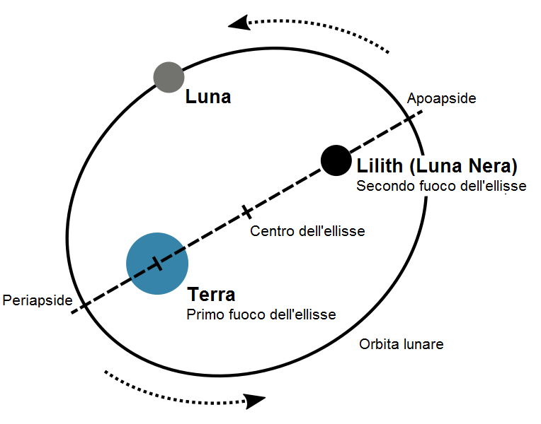 La posizione di Lilith o Luna Nera che occupa uno dei due fuochi all'interno dell'orbita ellittica della Luna, l'altro dei quali occupato dalla Terra.